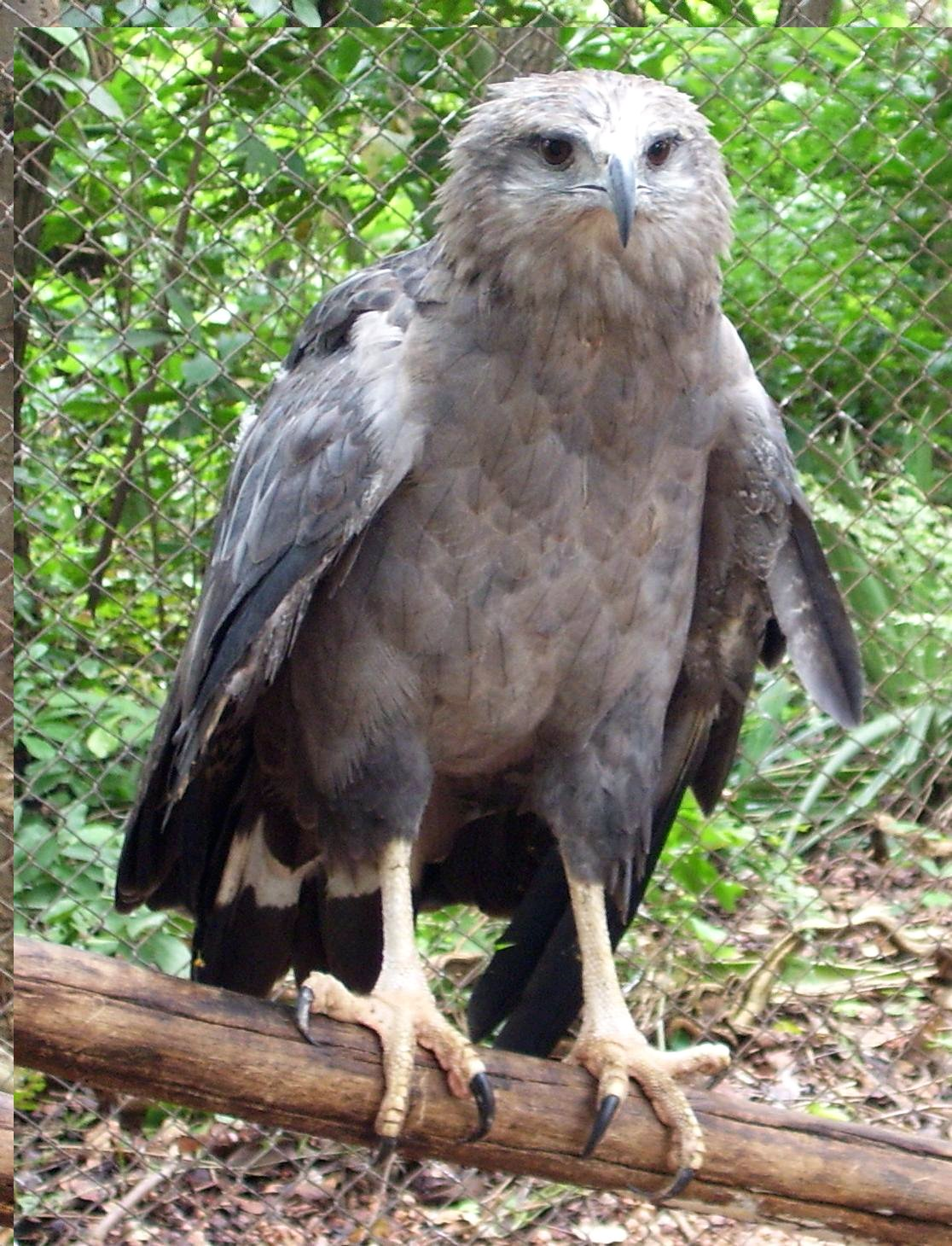 Buse couronnée